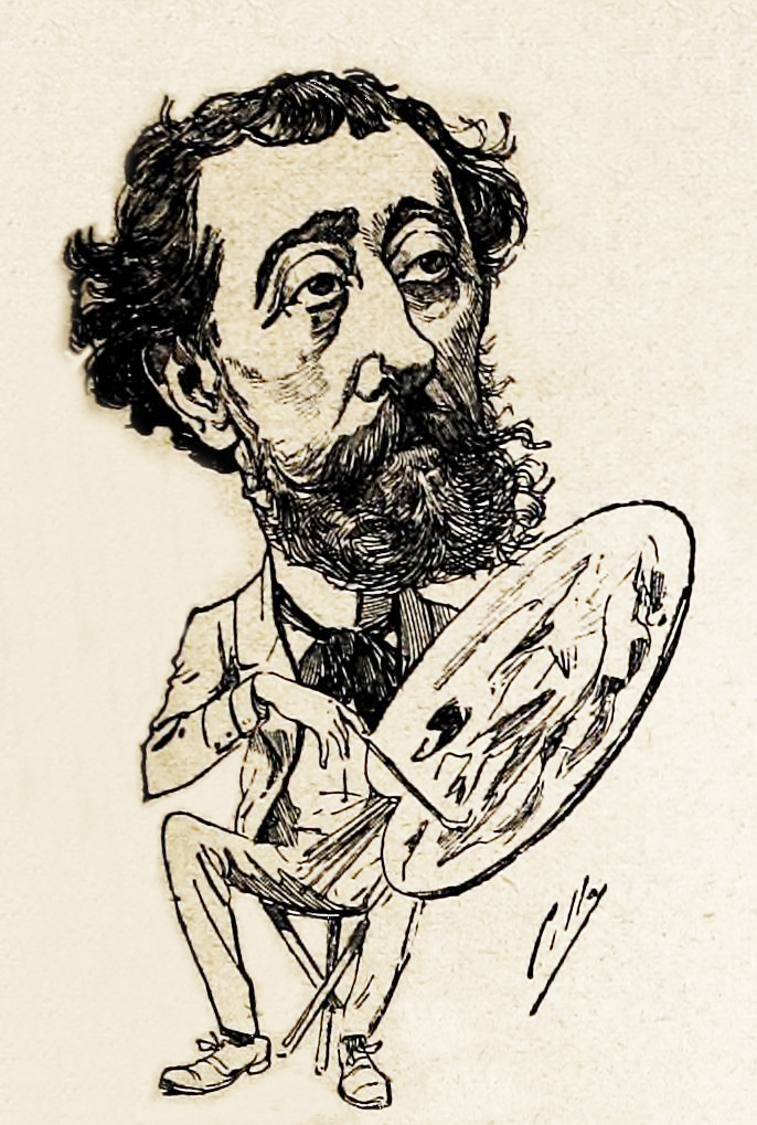 Los hombres del día. Paisistas y marinistas.